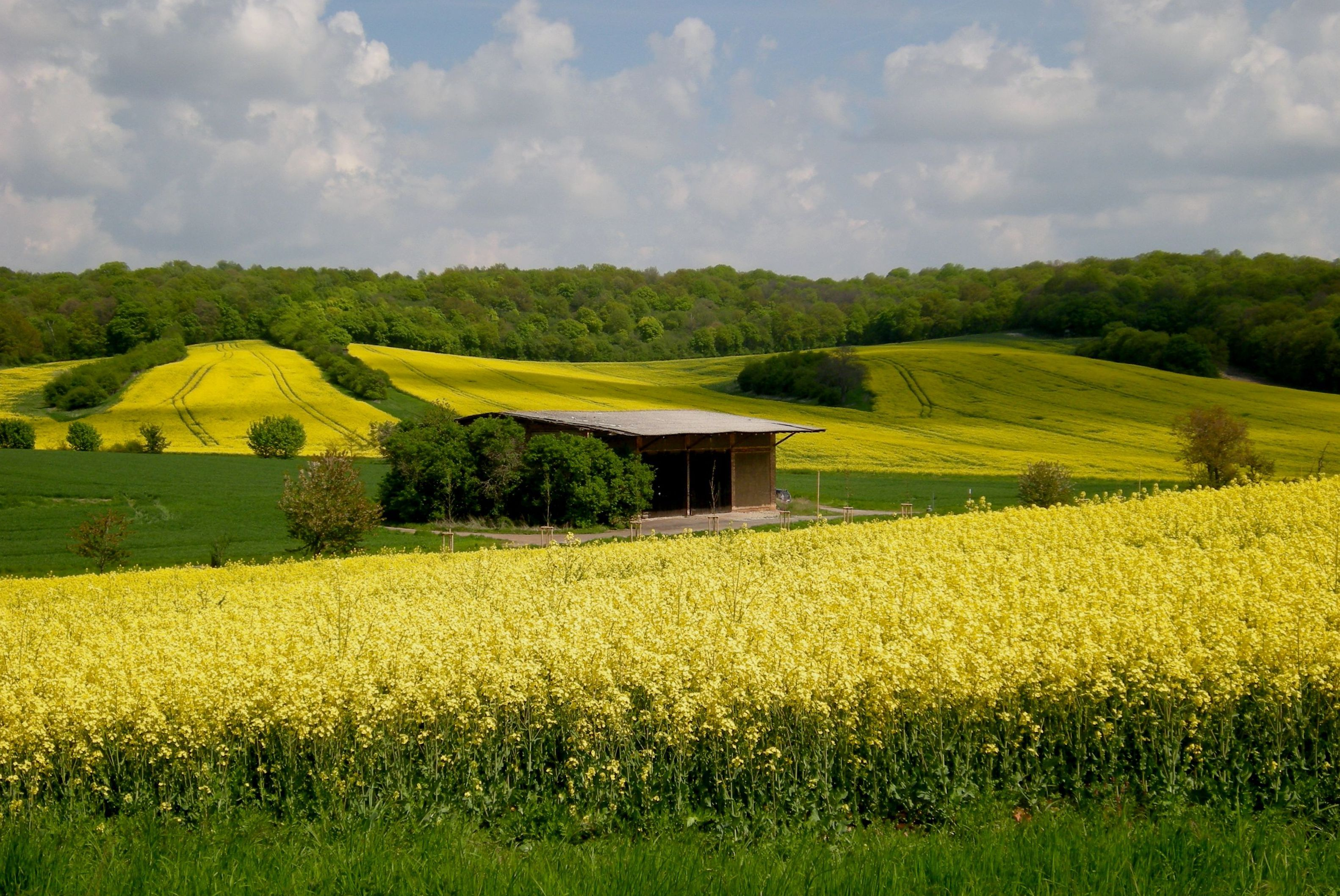 Querfurt - Rapsfelder